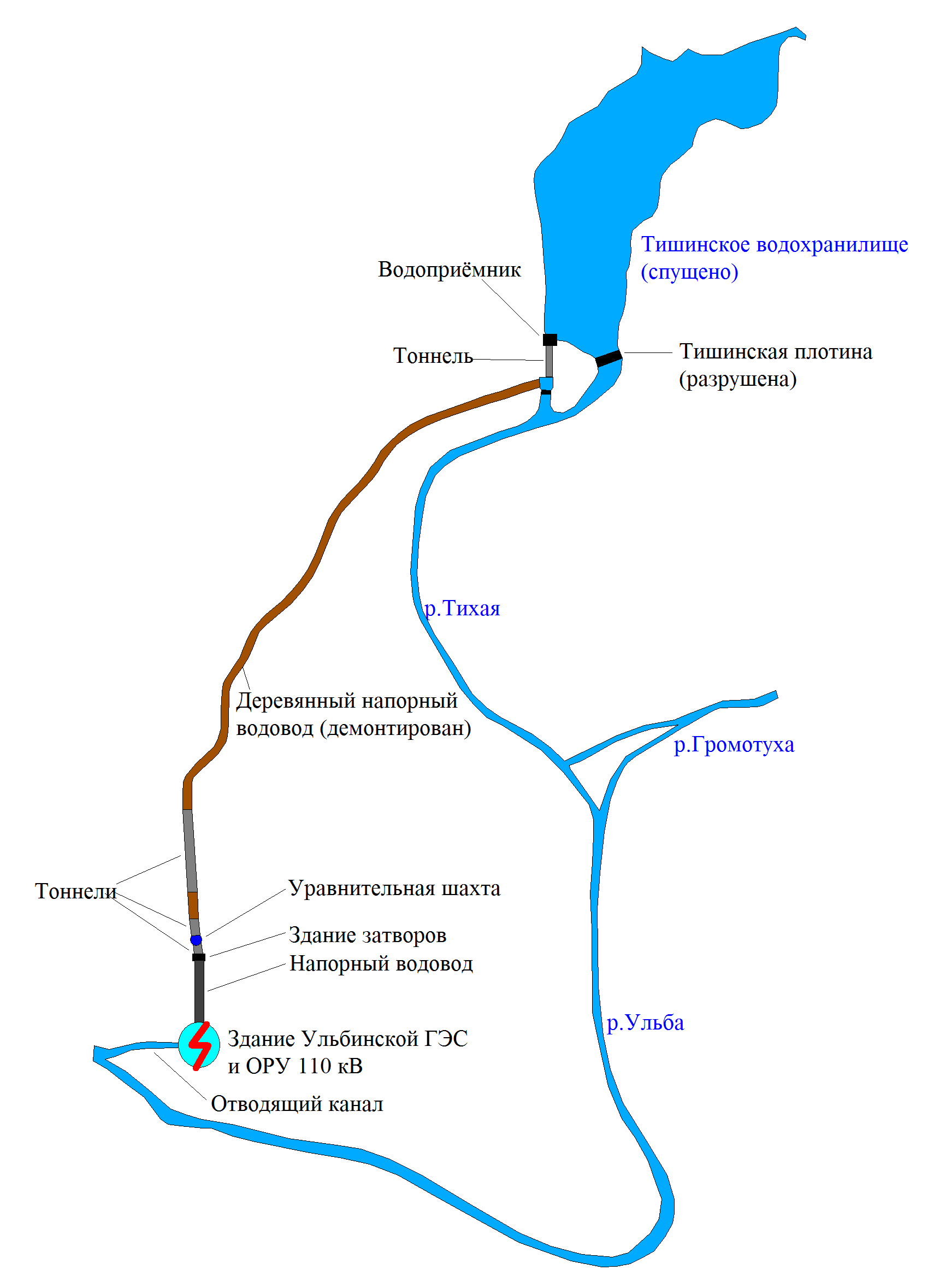 Схема Ульбинской ГЭС